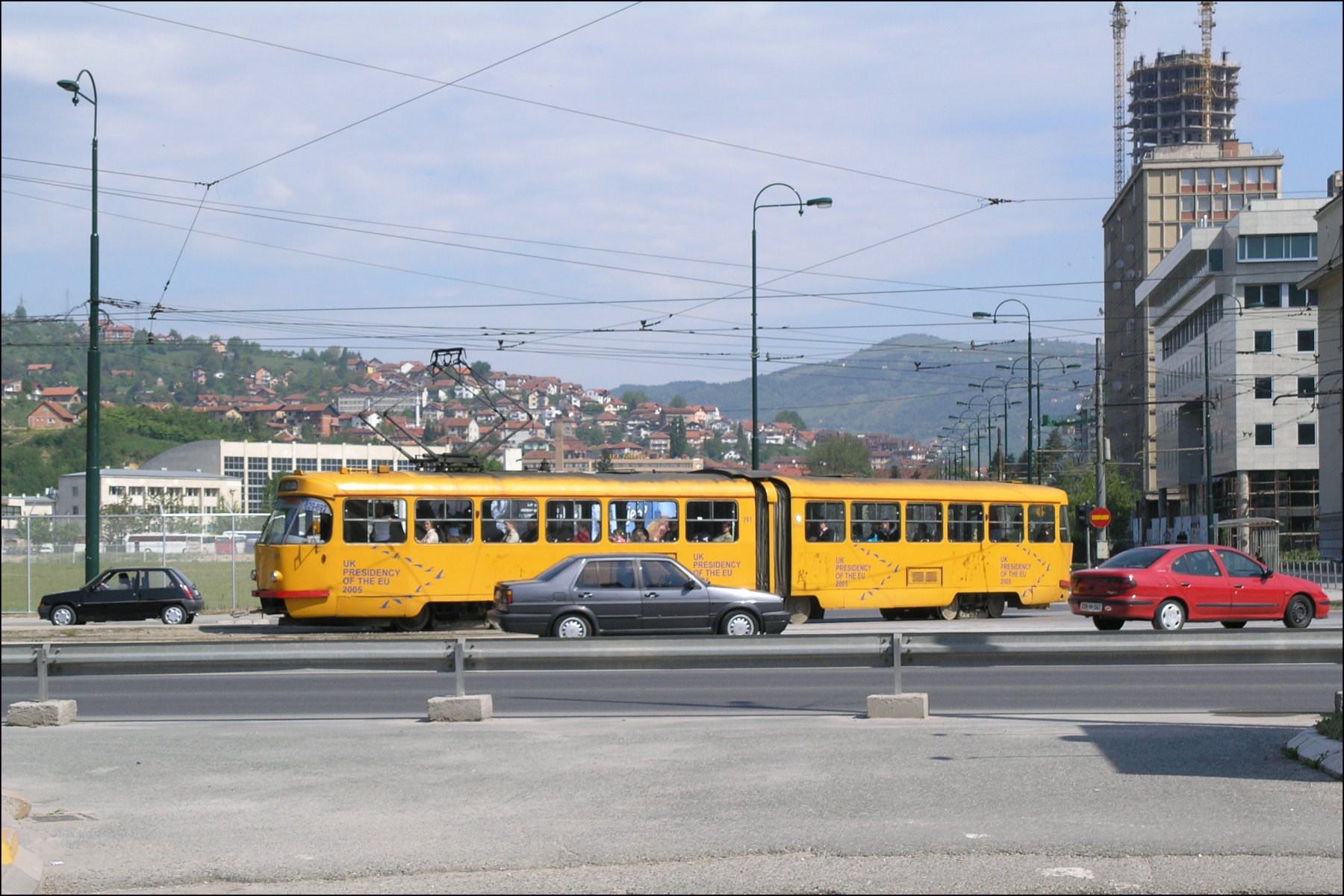 Tram K2YU in Sarajevo